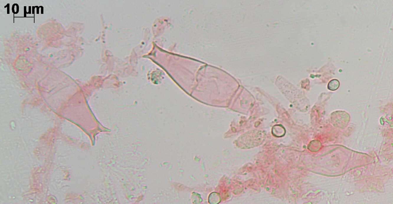 Pluteus hibbettii - pleurocystidia